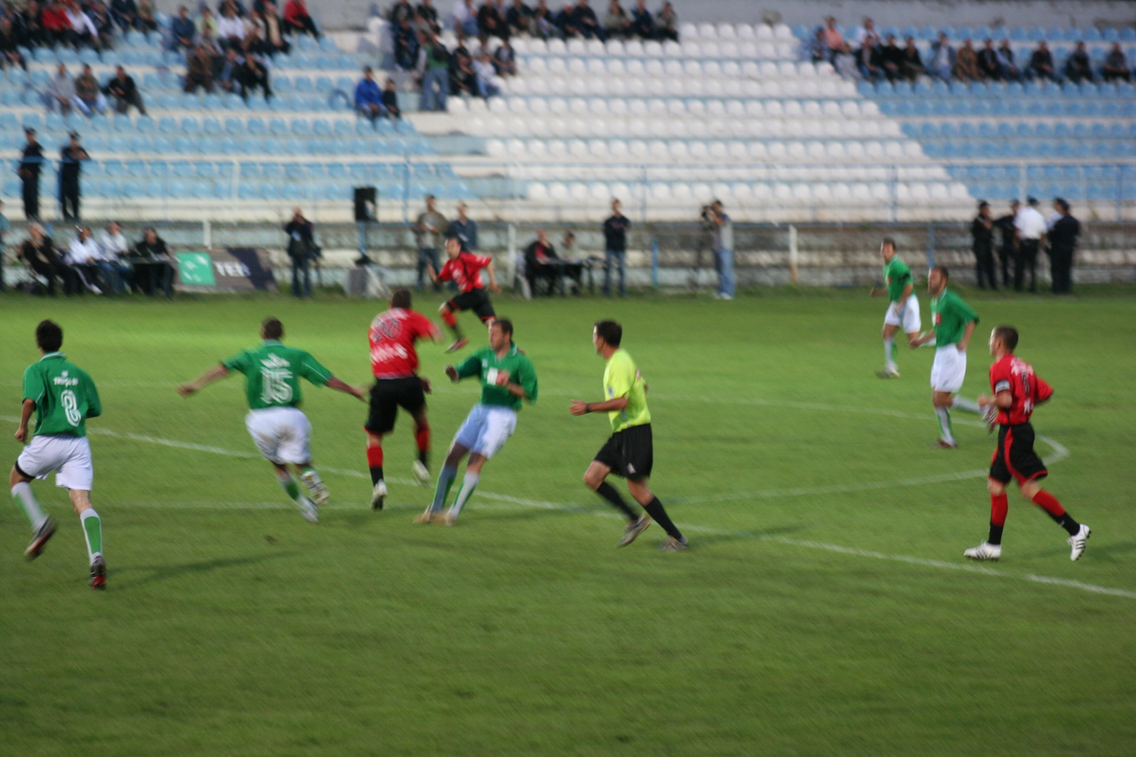 Go Gol